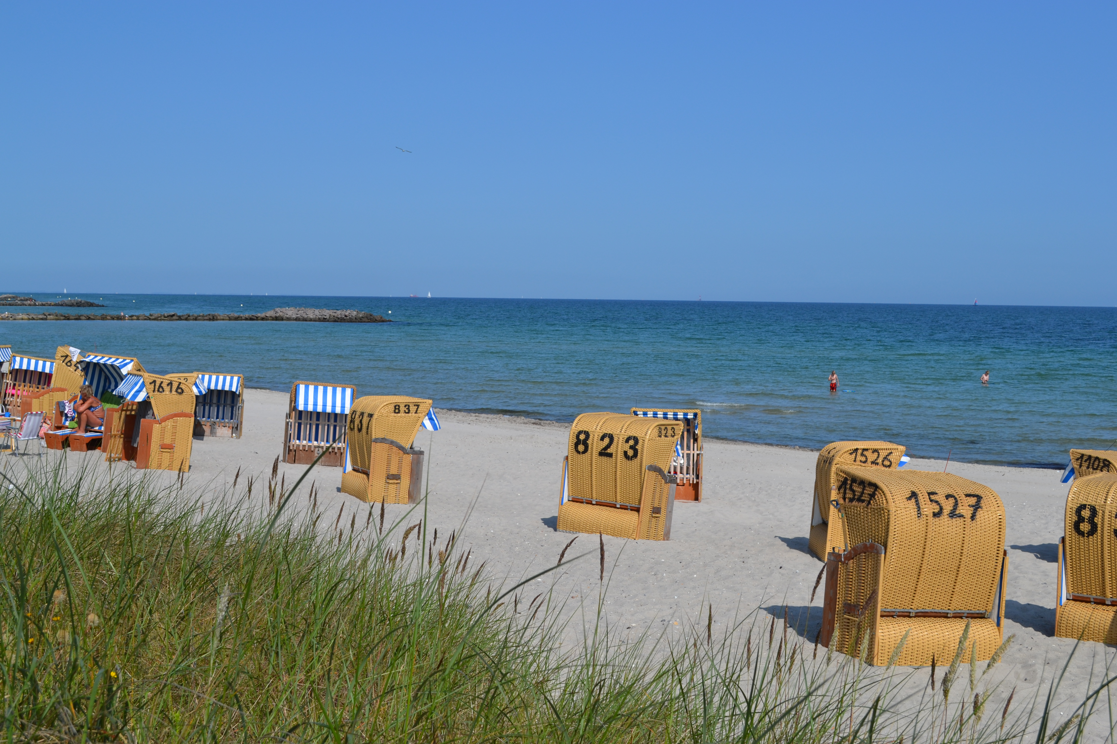 Strand in Schönberg-Kalifornien